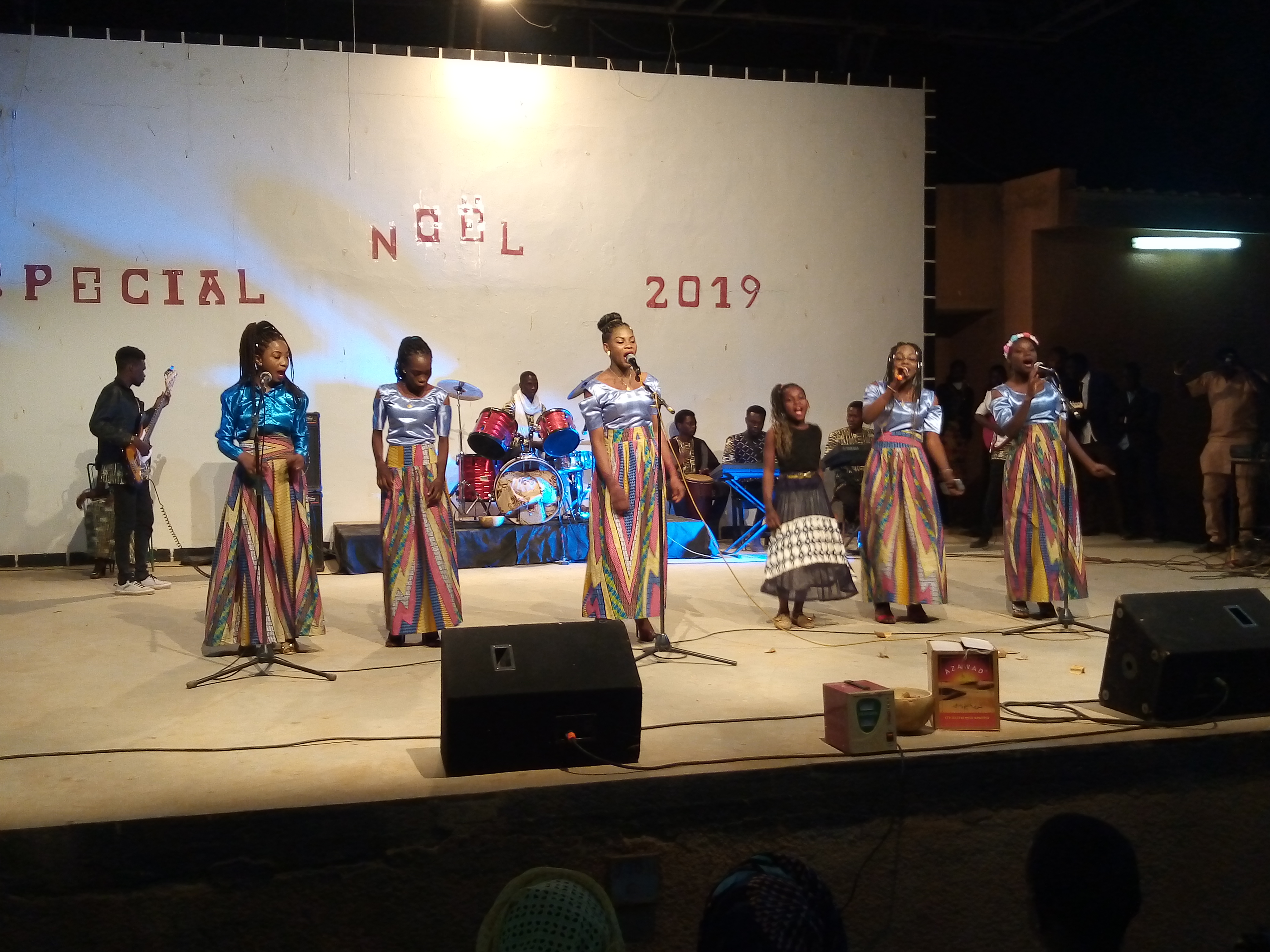 Performance du groupe Joyeux en Christ lors d'un concert bénéfice en faveur aux orphelinats, au CCFN (Centre Culturel Franco-Nigérien) le jour de Noël 2019.